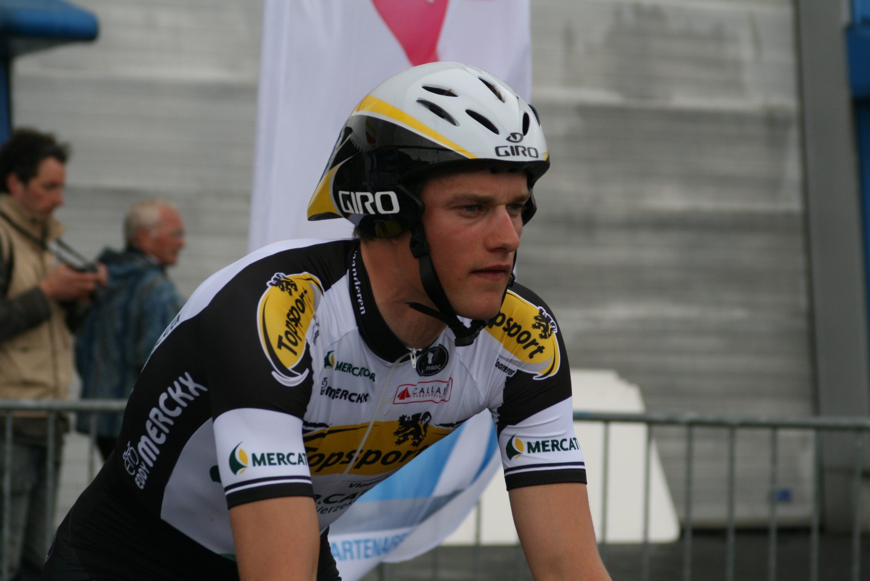 Nikolas Maes lors des Quatre jours de Dunkerque 2009